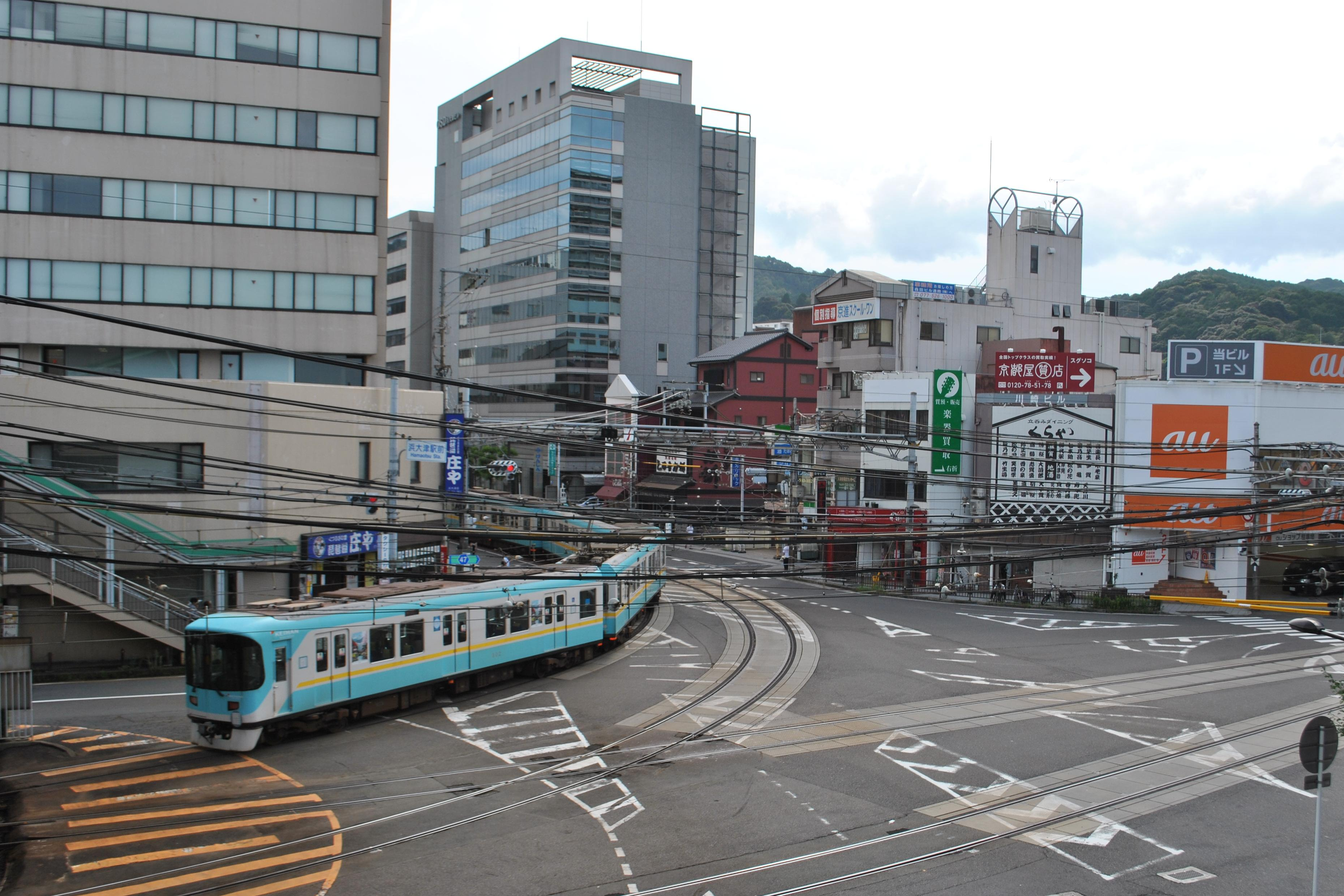 京阪電気鉄道の800形車浜大津にて